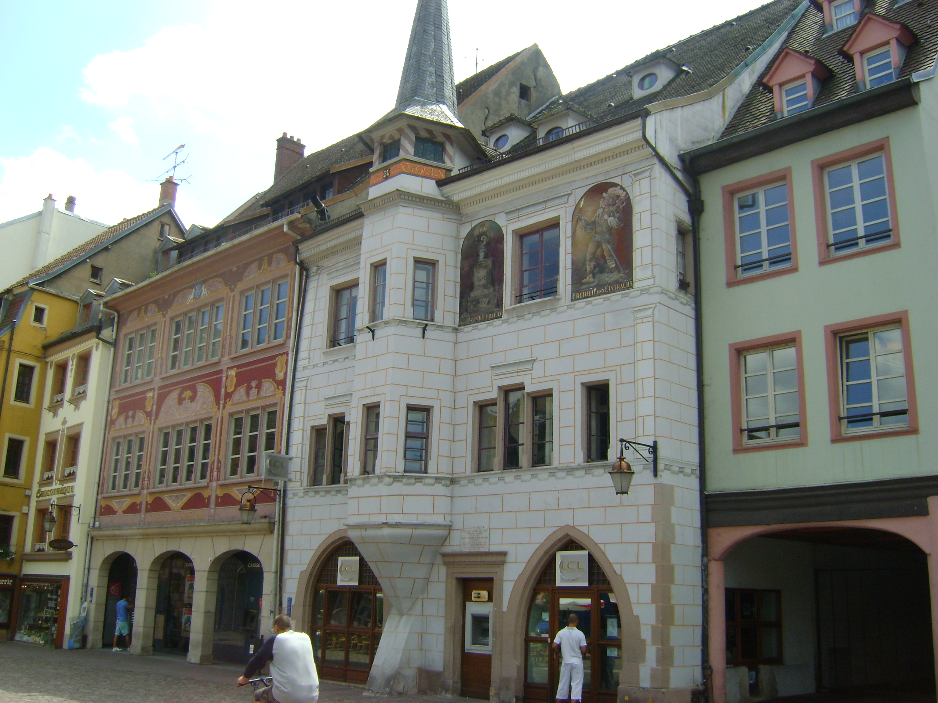 Ancienne maison Mieg, Place de la Réunion à Mulhouse